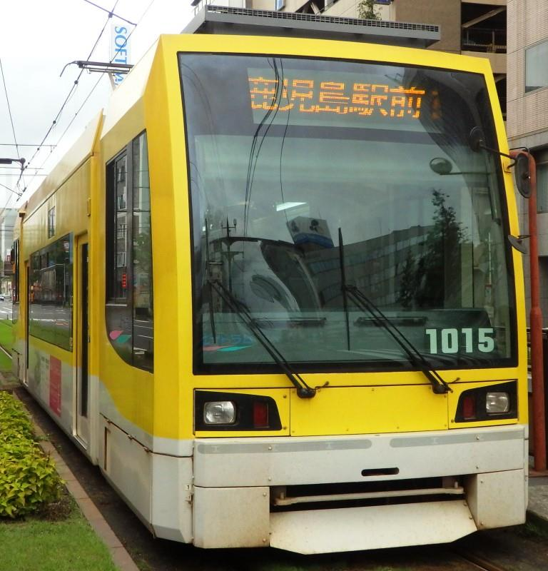 1015（２次車）